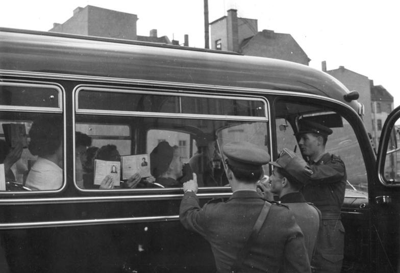 ADN-ZB-Hesse-30.10.1961-Durchführung der Grenzsicherungsmaßnahmen vom 13.8.1961 in Berlin, Kontrollpunkt Friedrichstr. - Angehörige der britischen Militärkommandatur zeigen ihre Ausweise den Posten der Volkspolizei beim Grenzübertritt. Veröffentlichung nur mit Genehmigung der Pressestelle des MDI